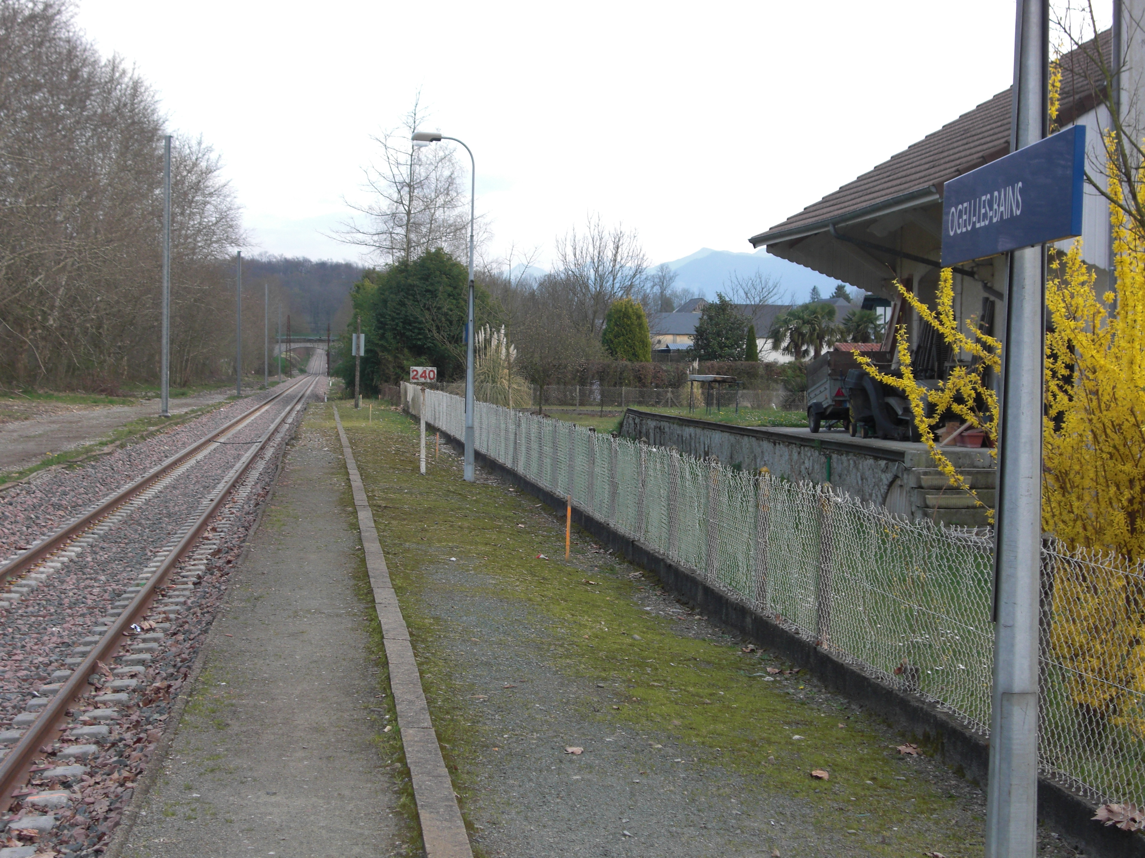 Quais de la gare d'Ogeu-Les-Bains (64).